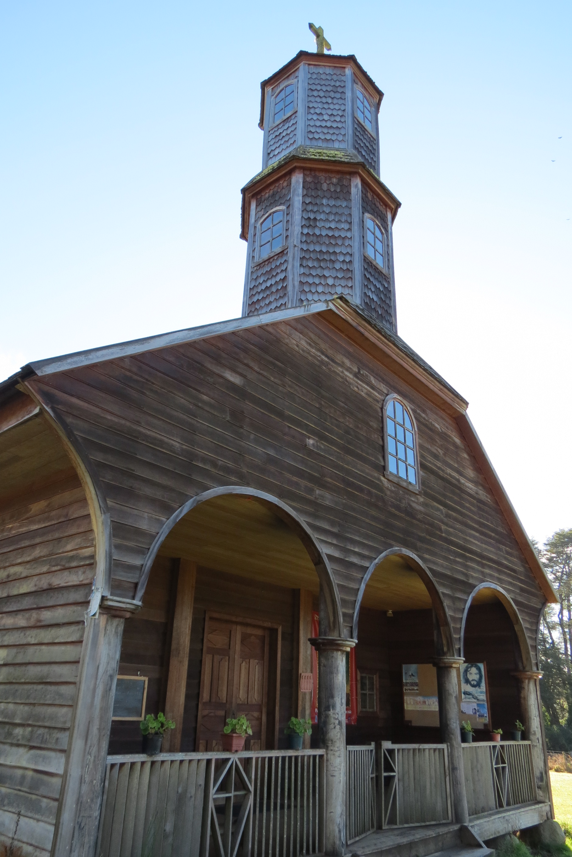 Fachada de la iglesia de San Antonio en Colo, Quemchi, Chile. This is a photo of a national monument in Chile: 131